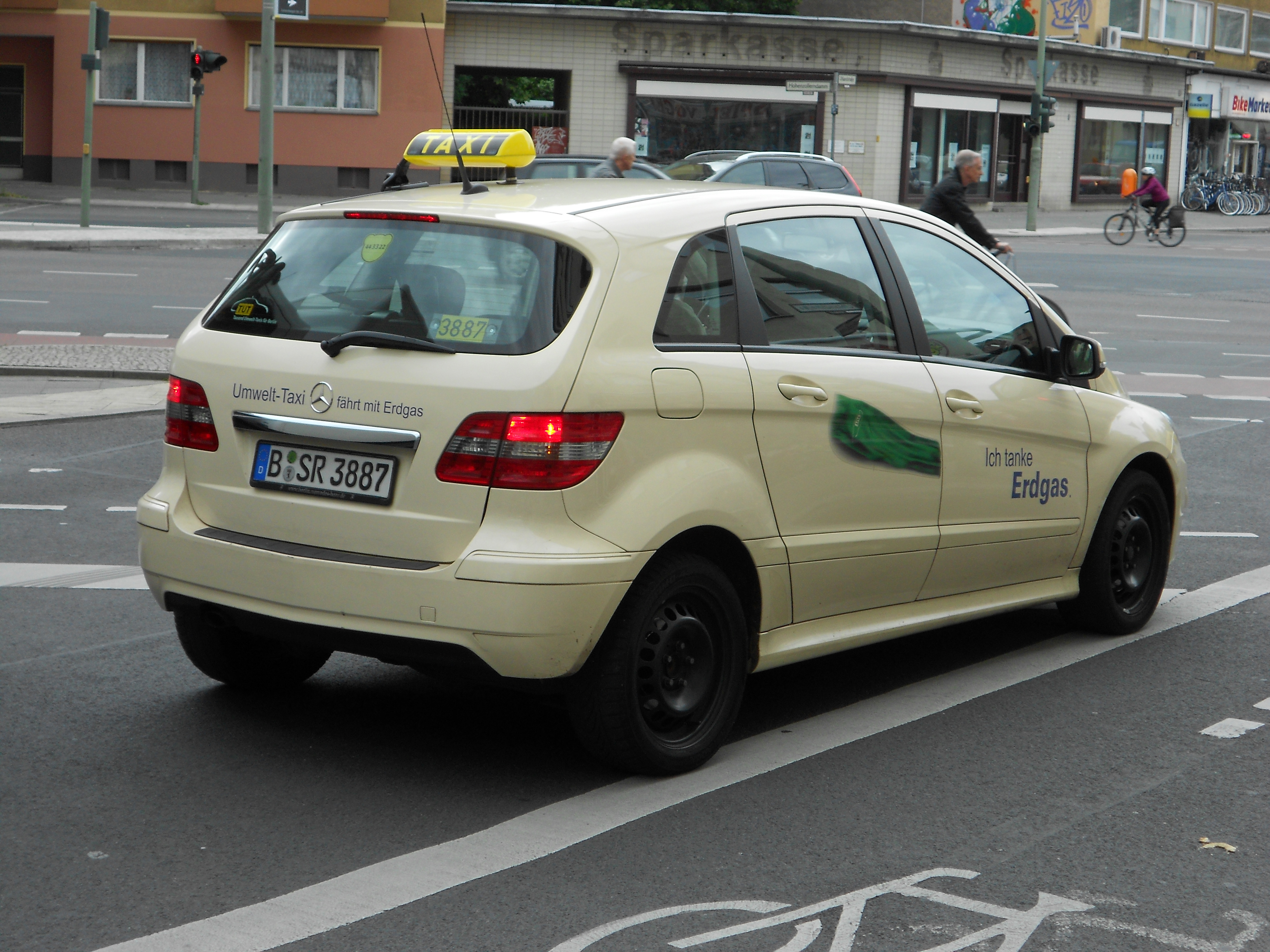 Велосипед или автомобили в Берлине - Только велосипед, стоящий за углом в Берлине. И случайных автомобили.